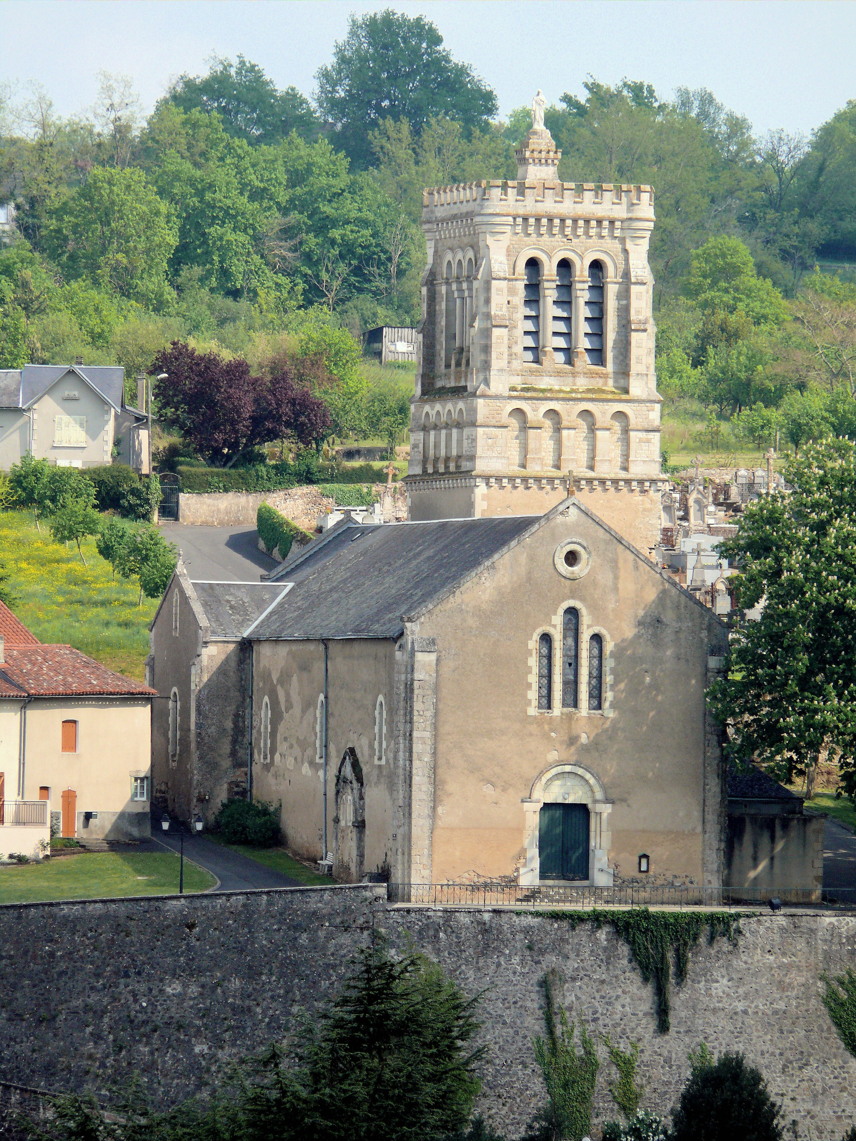 L'Isle-Jourdain - Eglise Saint-Gervais-et-Saint-Protais